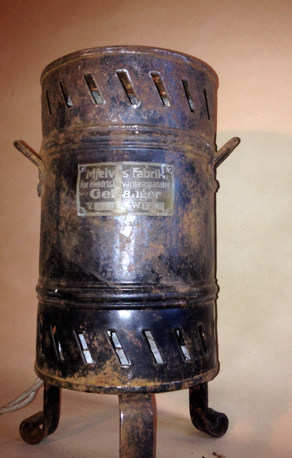 Ein Mjelva varmeomn, 350 KW, truleg produsert på Geiranger,før 1919.